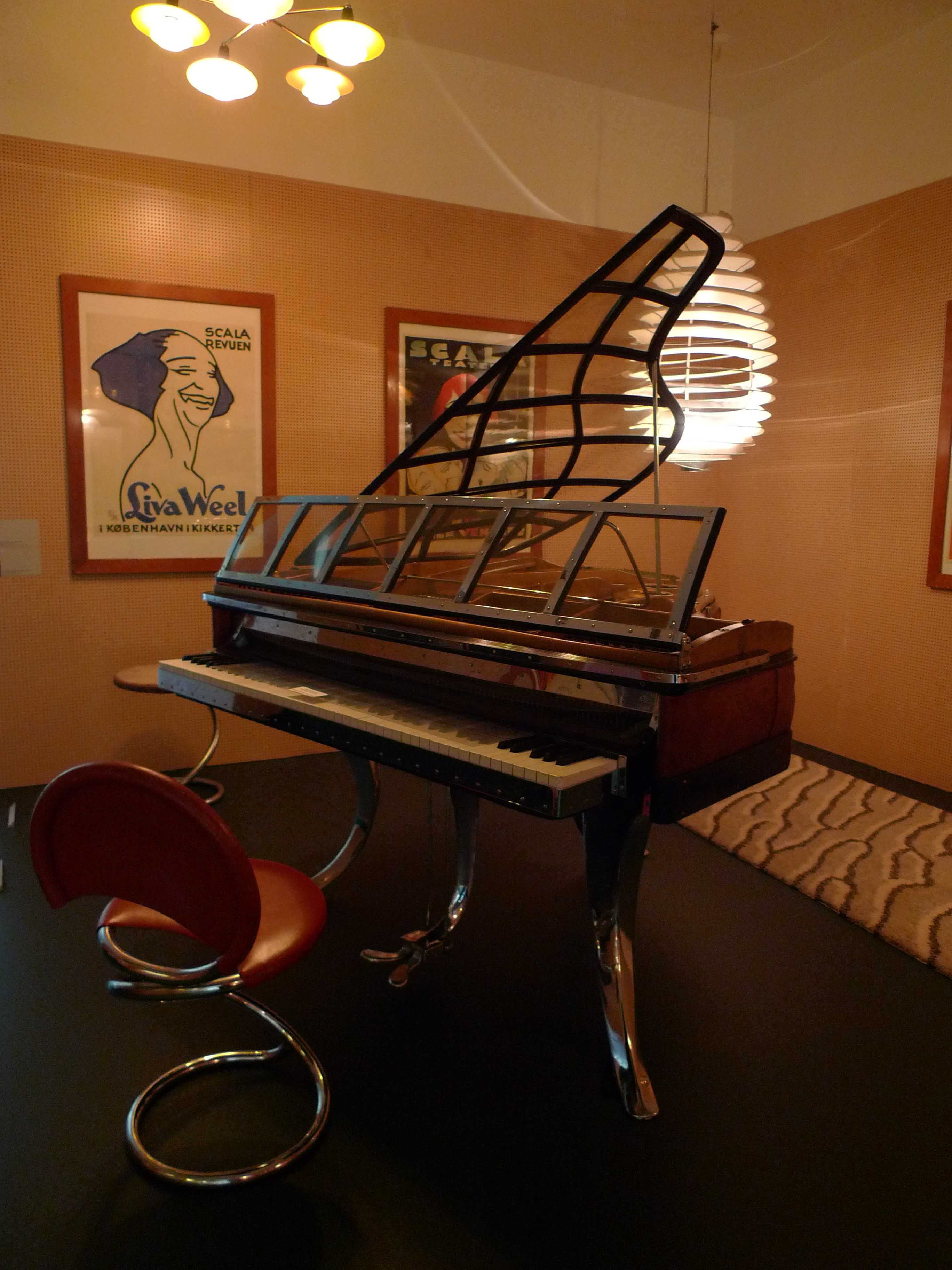 Poul Henningsen designed piano at ddisplay in Design Museum Denmark in Copenhagen, Denmark